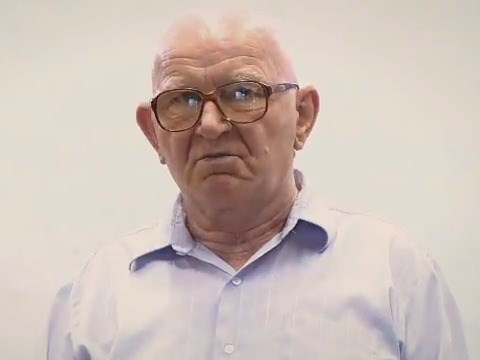 Jan Ludwiczak (1937-), śląski robotnik i działacz opozycji antykomunistycznej w PRL.